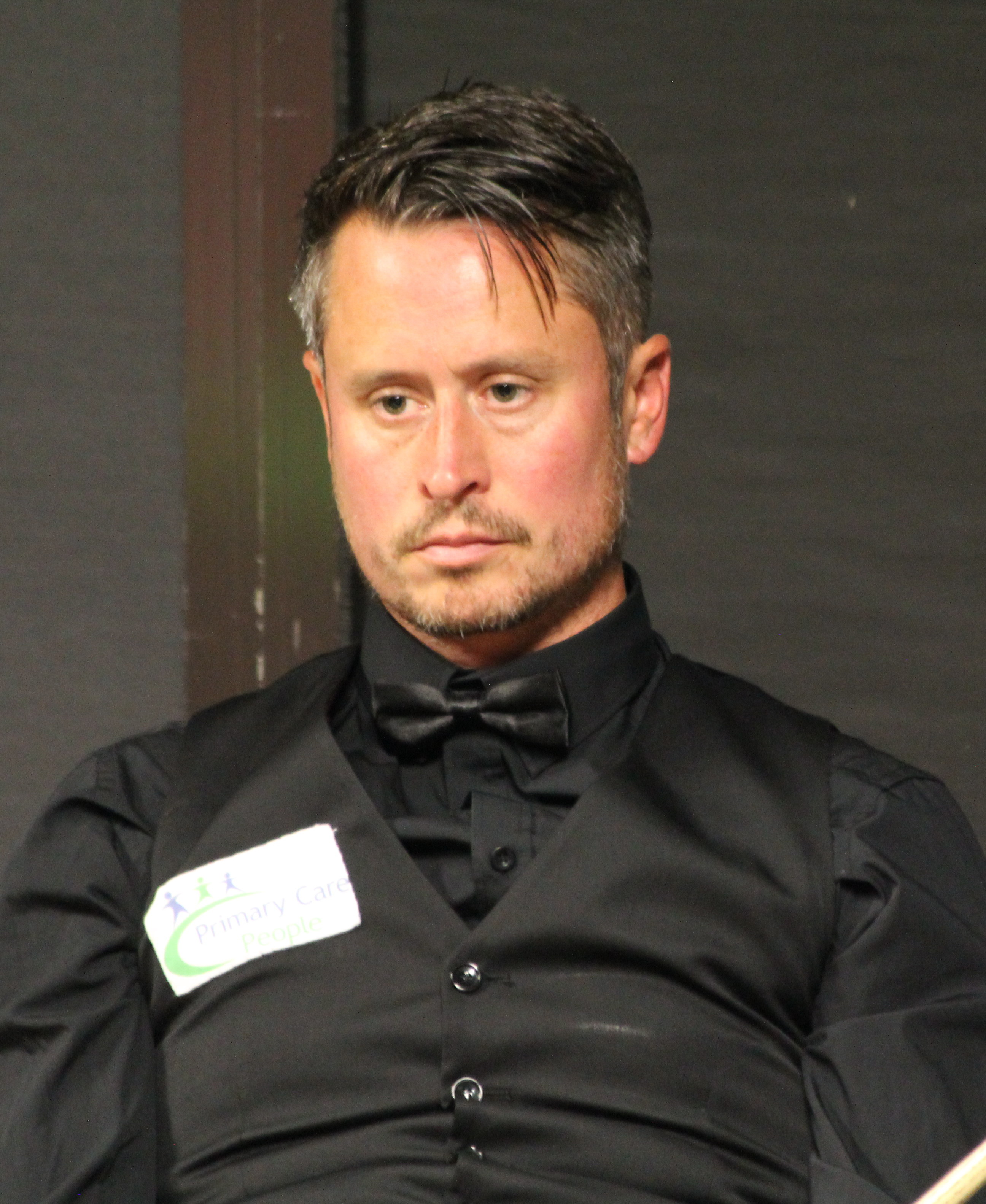 Alfie Burden beim Paul Hunter Classic 2016